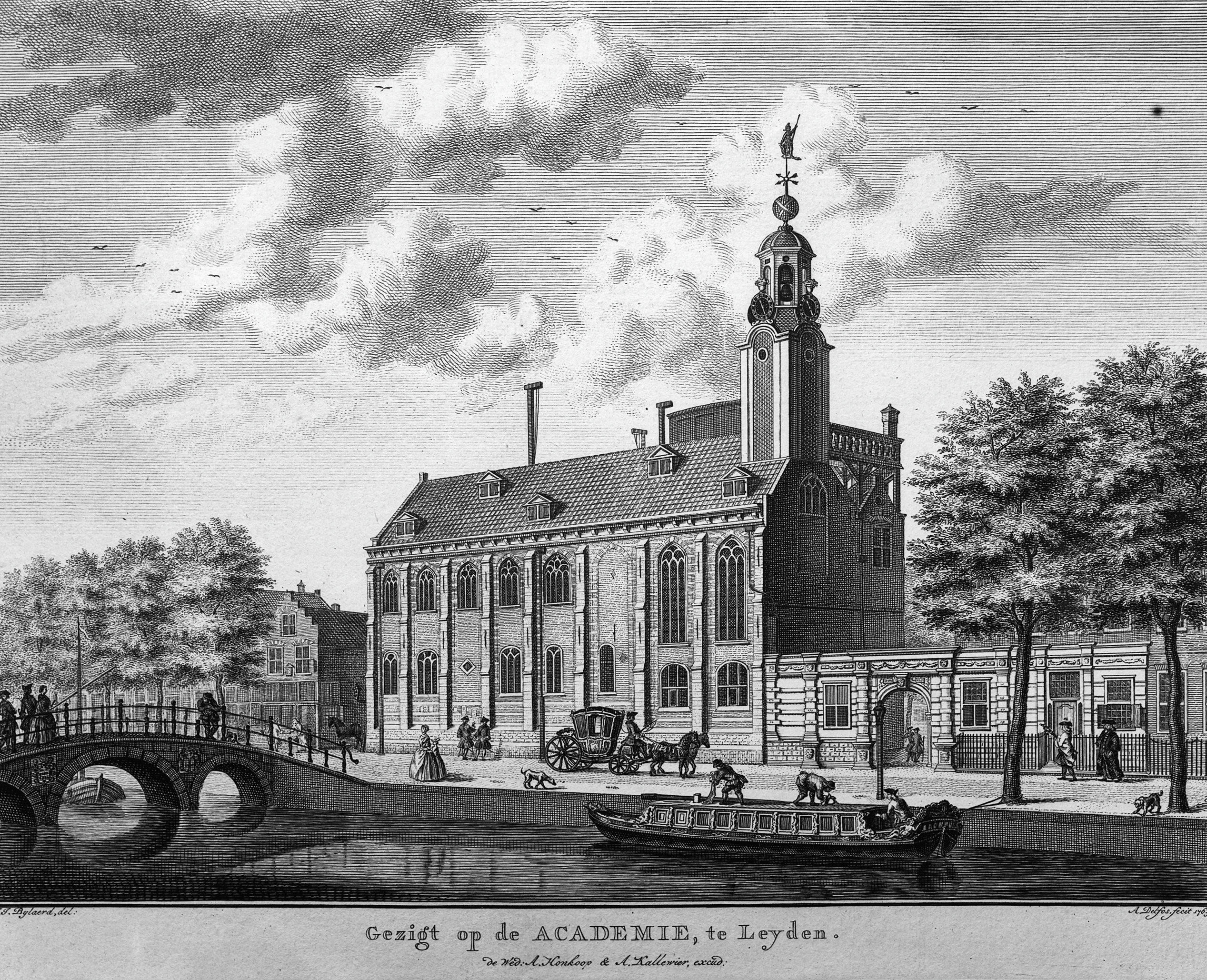 Academie: naar een gravure van 1763